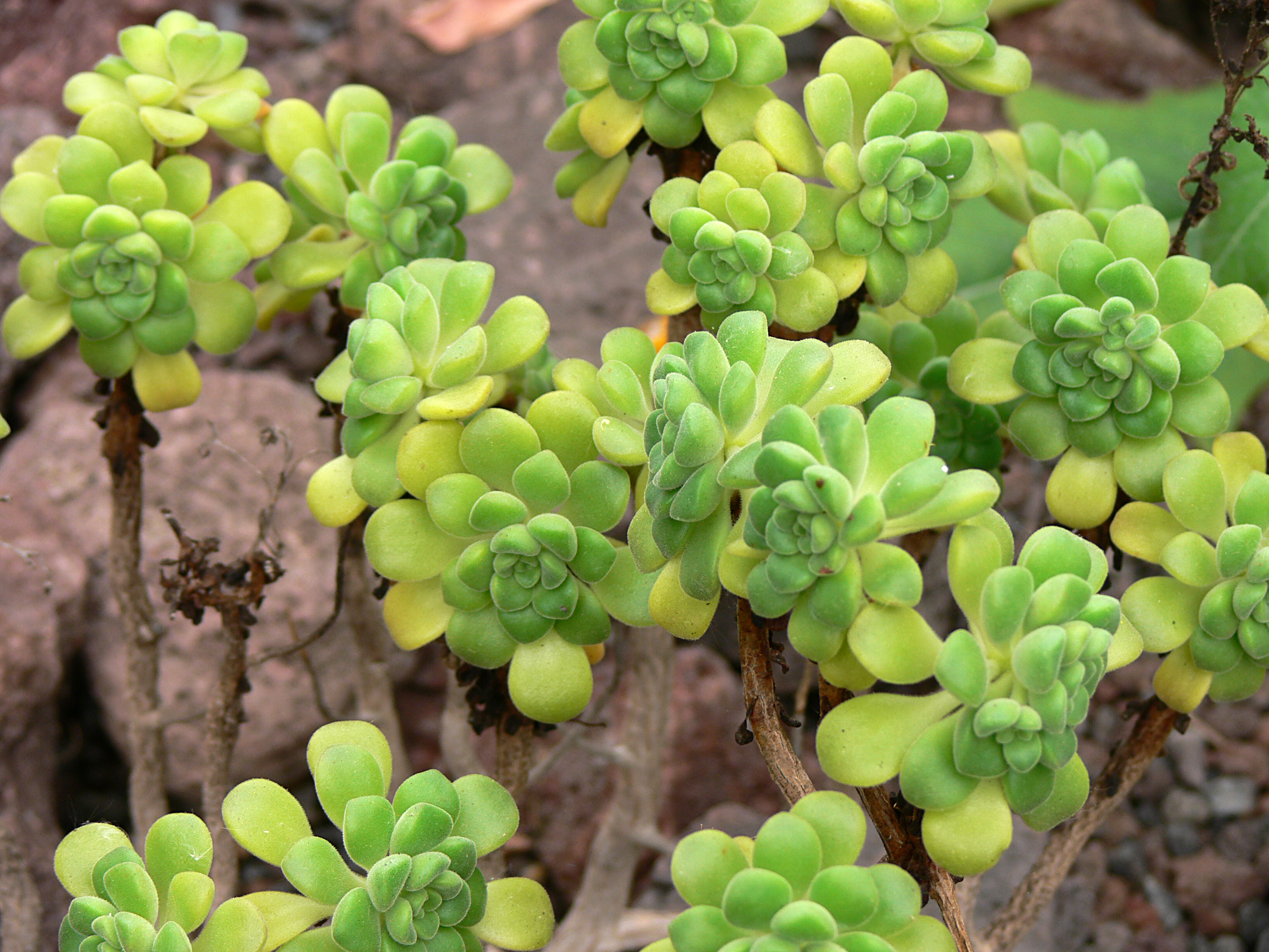 Aeonium lindleyi WEBB et BERTH., Botanischer Garten Krefeld